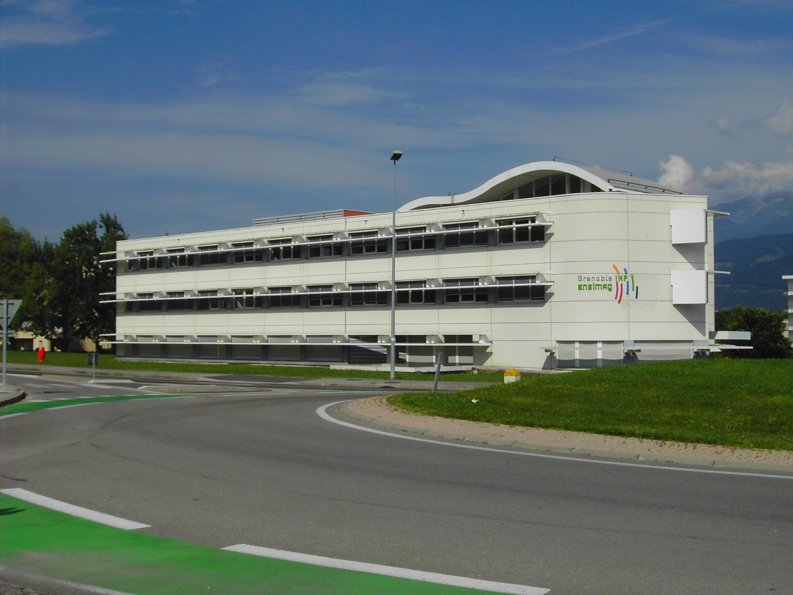 bâtiment ENSIMAG sur inovallée - Montbonnot, Isère